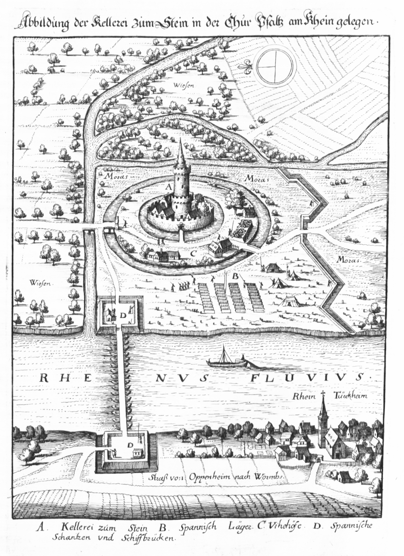 Topographia Palatinatus Rheni et Vicinarum Regionum Das ist, Beschreibung vnd Eigentliche Abbildung der Vornemsten Statte, Plätz der Vntern Pfaltz am Rhein Vnd Benachbarten Landschafften, als der Bistümer Wormbs Vnd SpeÈyer, der Bergstraß, des Wessterreichs, Hundsrücks, ZweÈybrüggen, etc